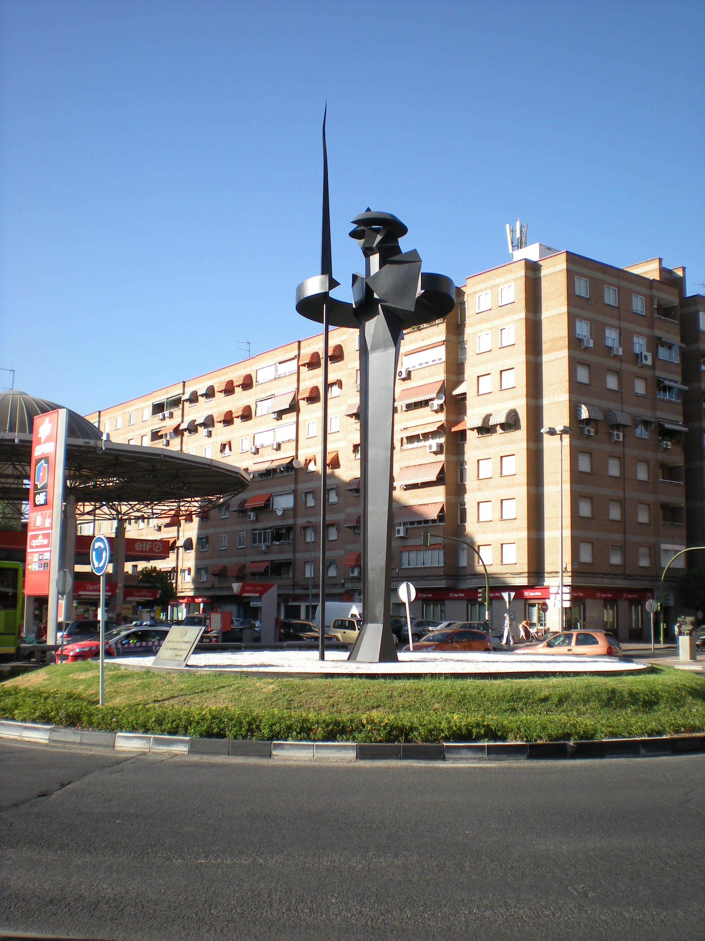 Monumento al Quijote. Vía Complutense - Paseo de la Estación. Alcalá de Henares. Comunidad de Madrid. España.